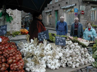 Marchnad yn Dinan, Llydaw 2007 yn gwerthu garlleg a nionod